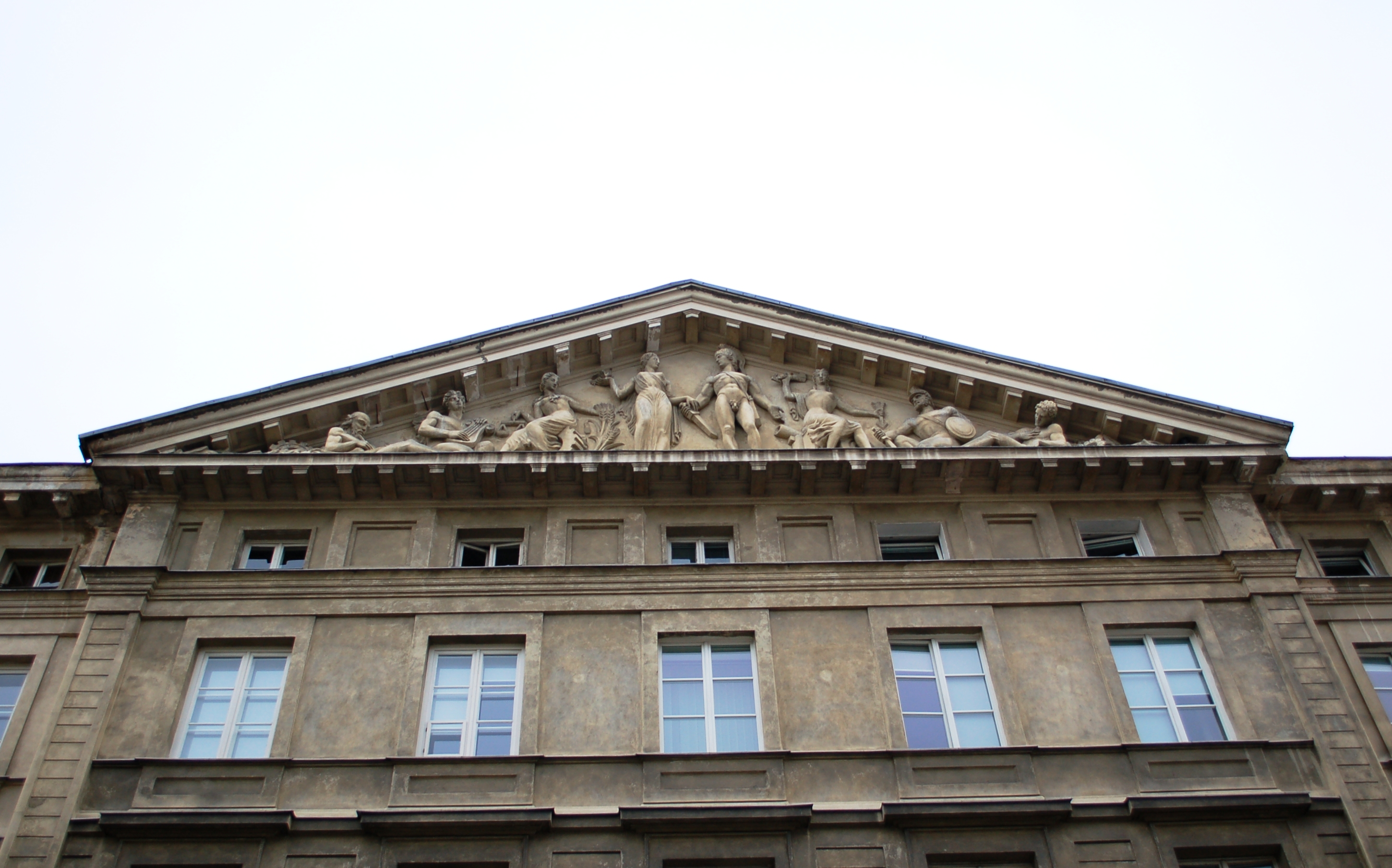 Warschau, Nowy Świat